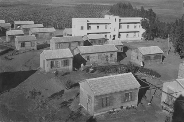 גבעת חיים בעמק חפר - מראה בניין בית הילדים